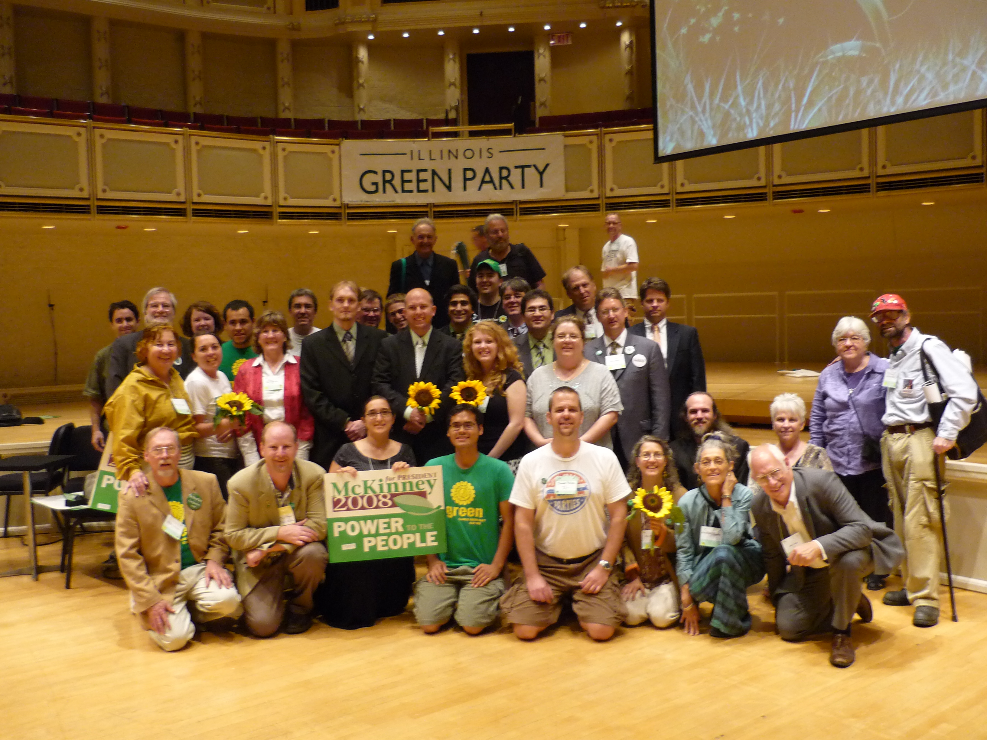 and friends